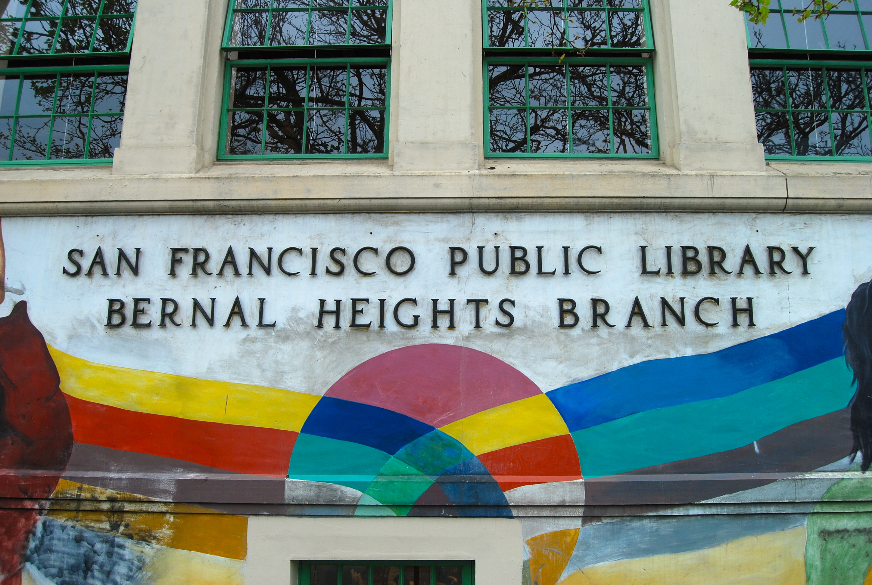 Bernal mural